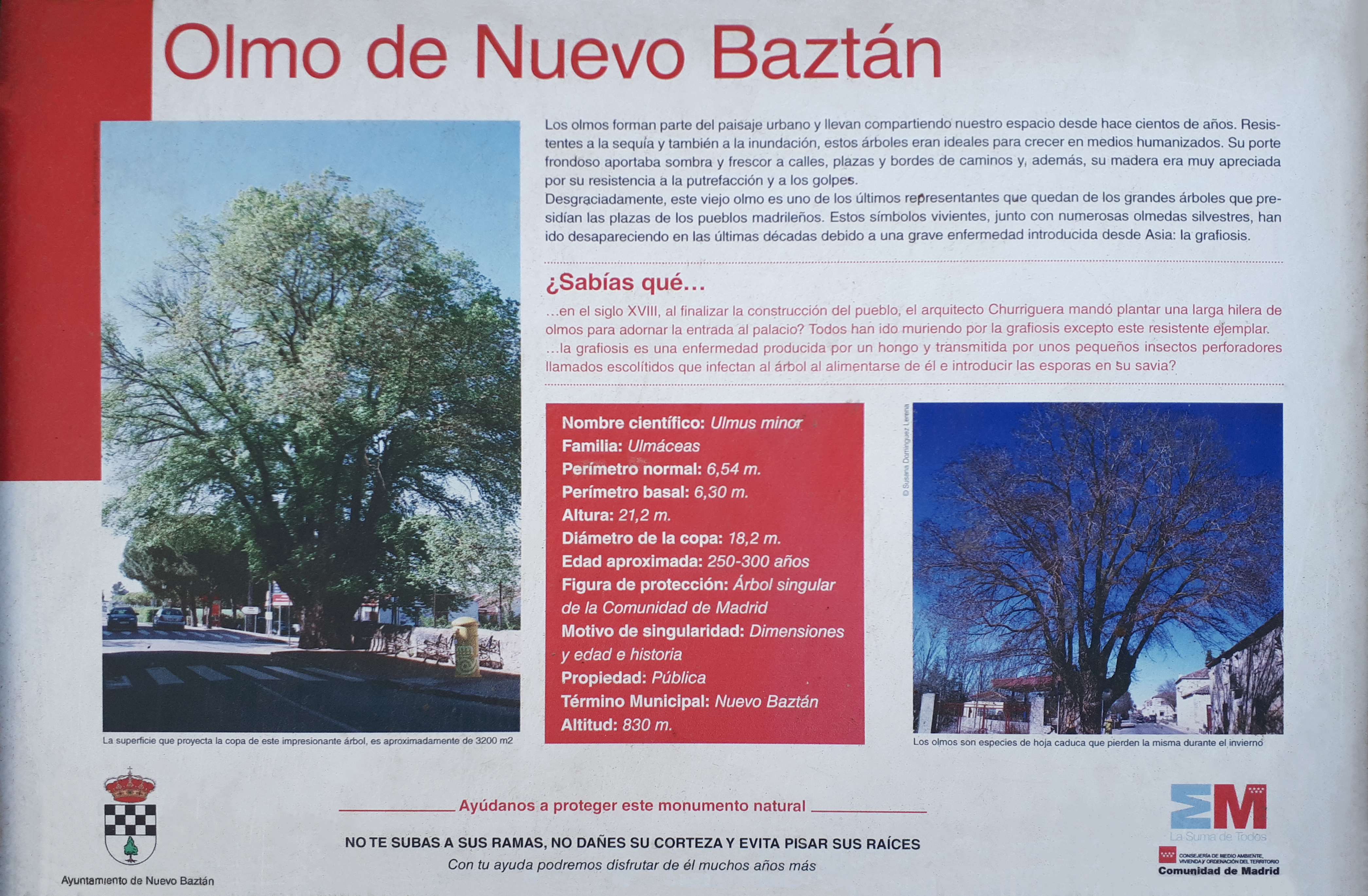 Cartel informativo del Olmo de Nuevo Baztán. Ulmus minor catalogado, desde 1992, como Árbol Singular de la Comunidad de Madrid (España).